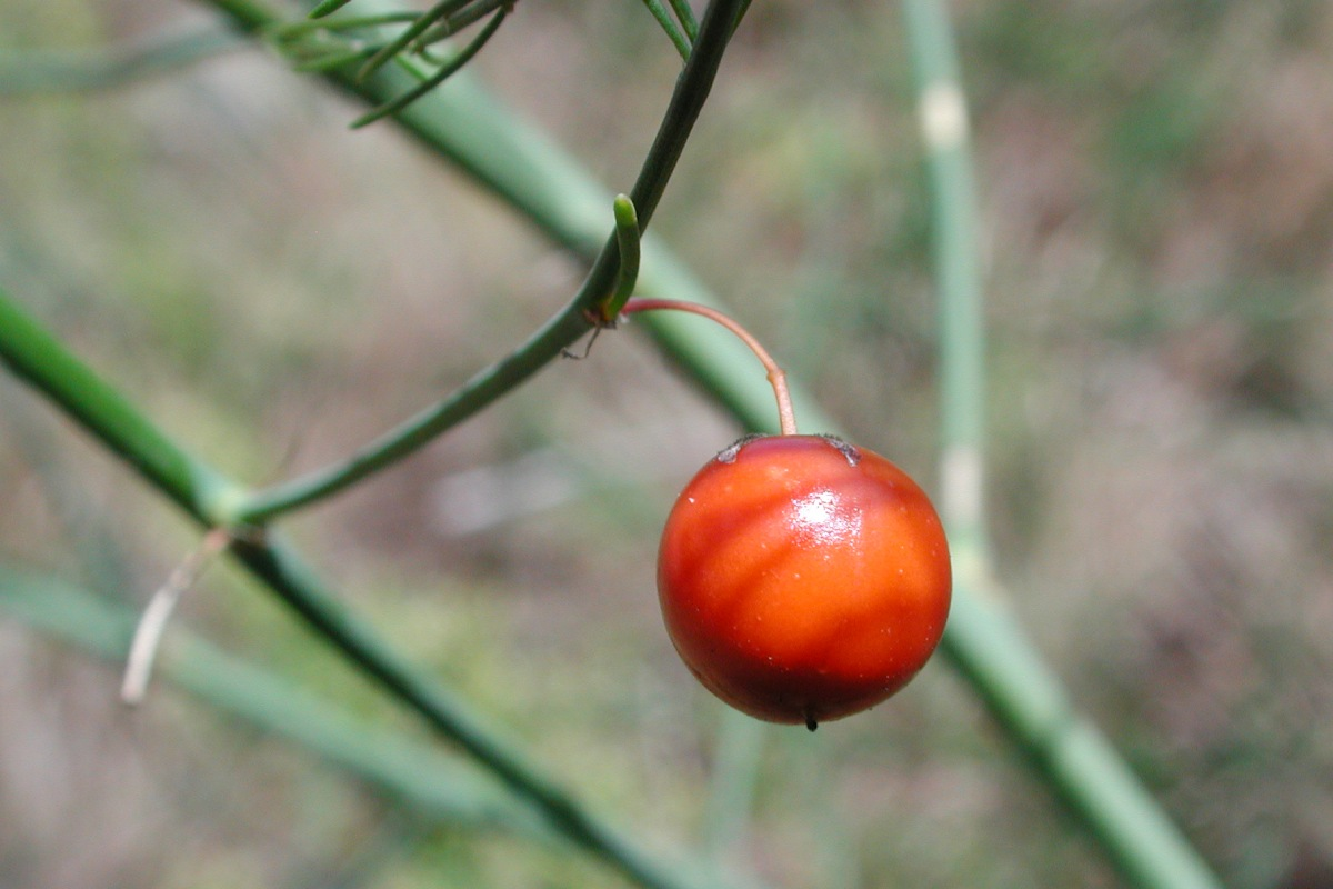 Spargel (Asparagus officinalis), Eberstädter Düne, Darmstadt, Hessen, Deutschland